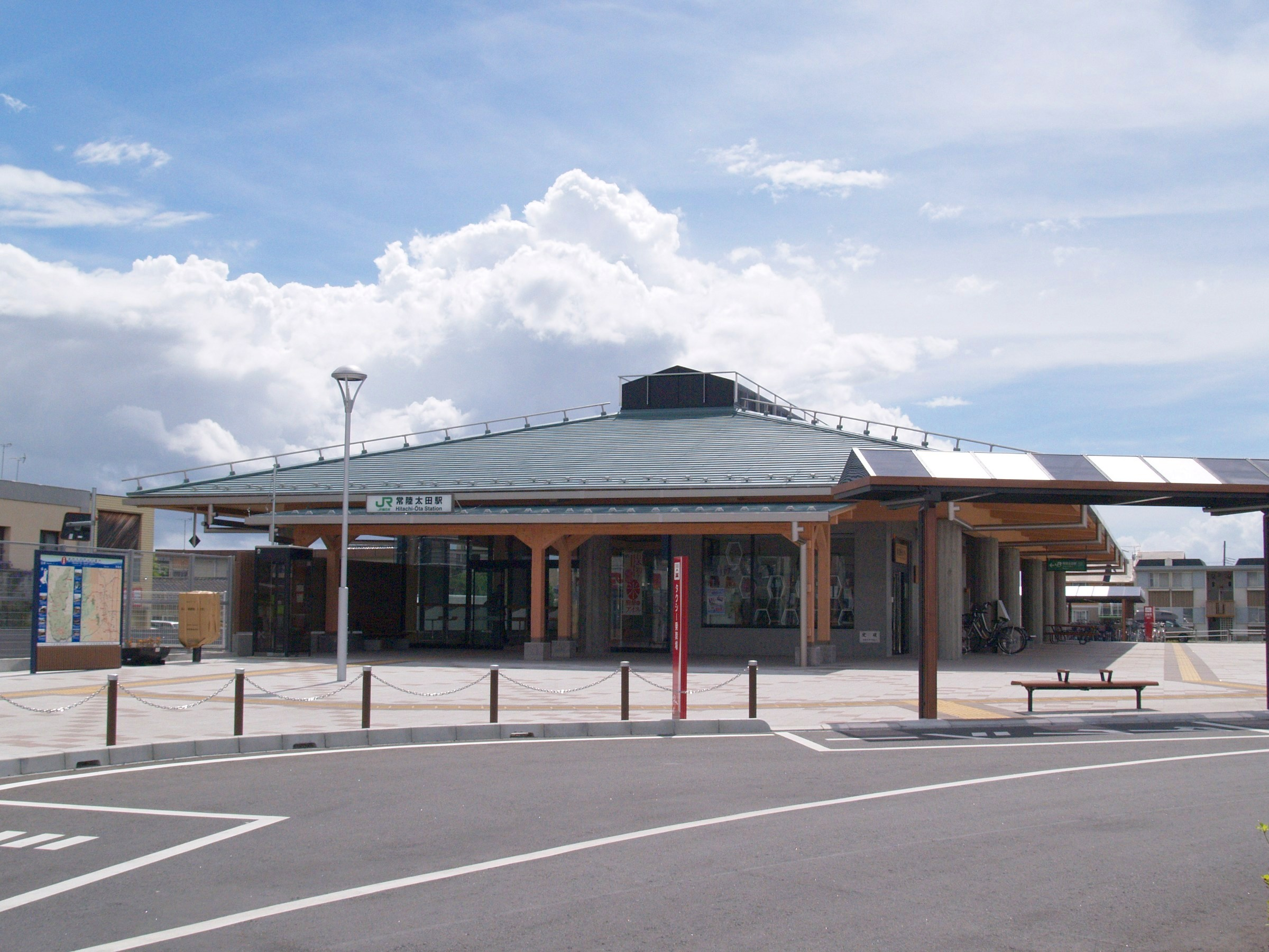 常陸太田駅